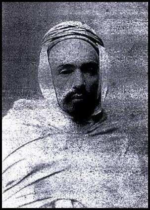 Philippe Grenier, date inconnue.